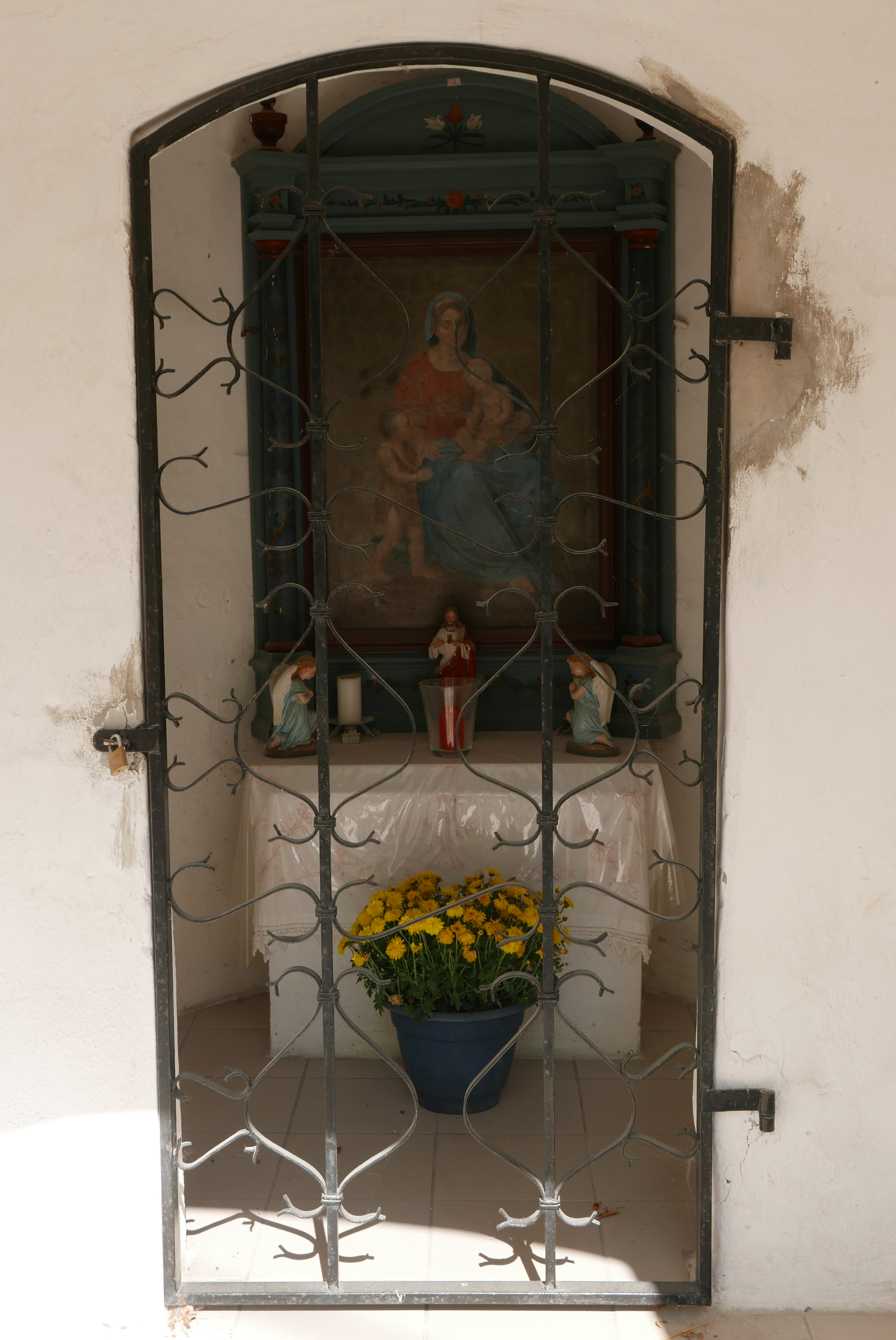 Feldkapelle, 18. Jahrhundert, Baudenkmal: D-7-74-119-1This is a photograph of an architectural monument.